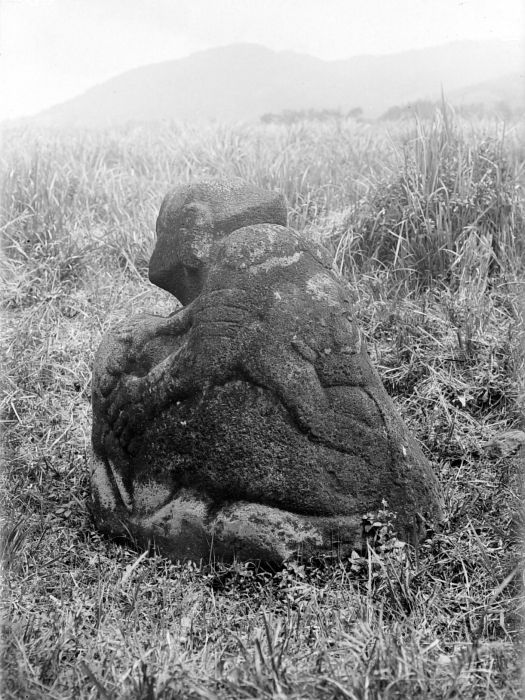 Negatief. Megalitisch beeld in een veld met alang-alang bij Poelaupanggoeng